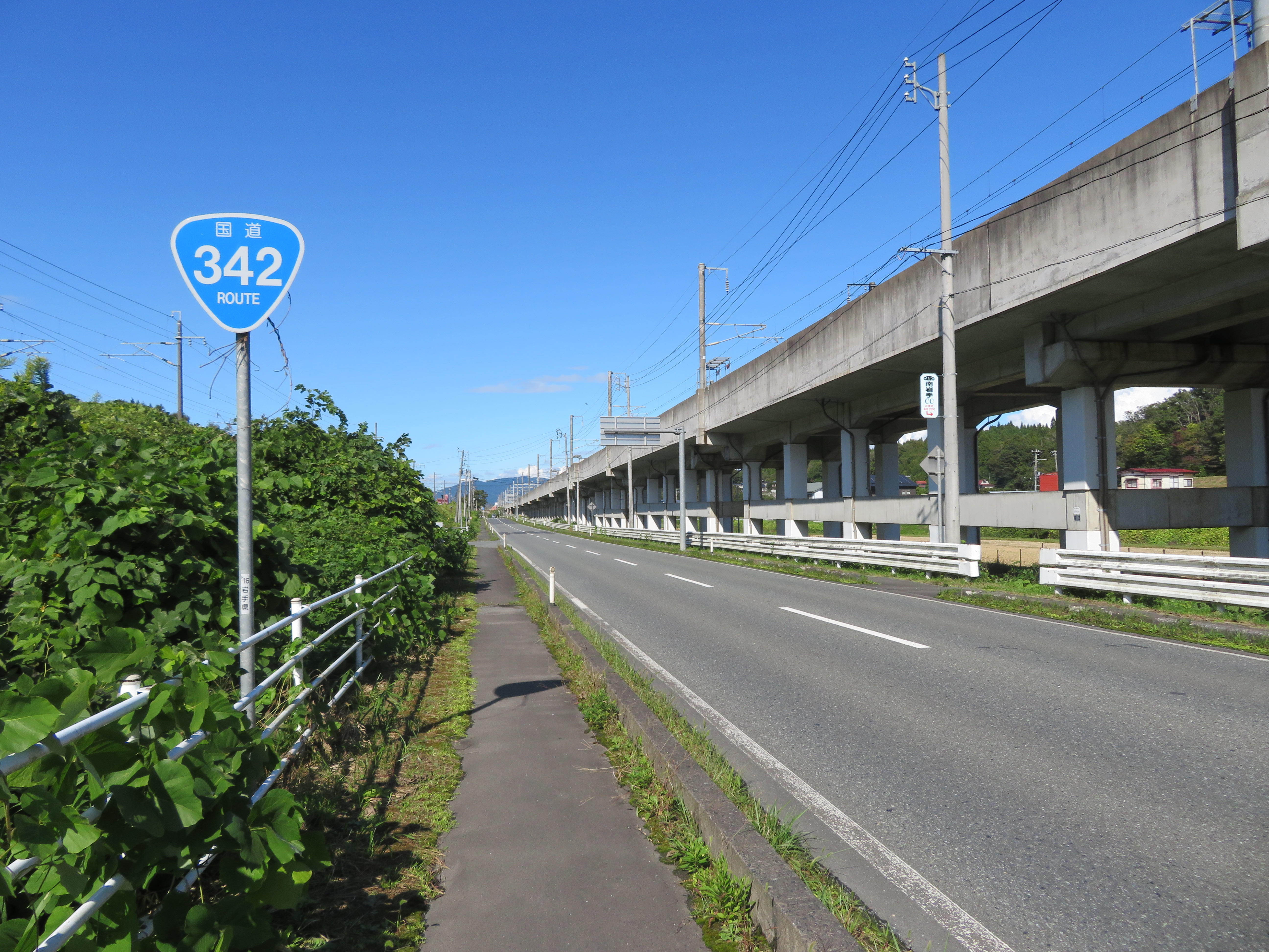 国道342号岩手県一関市真柴八幡付近（一ノ関駅方面を撮影）